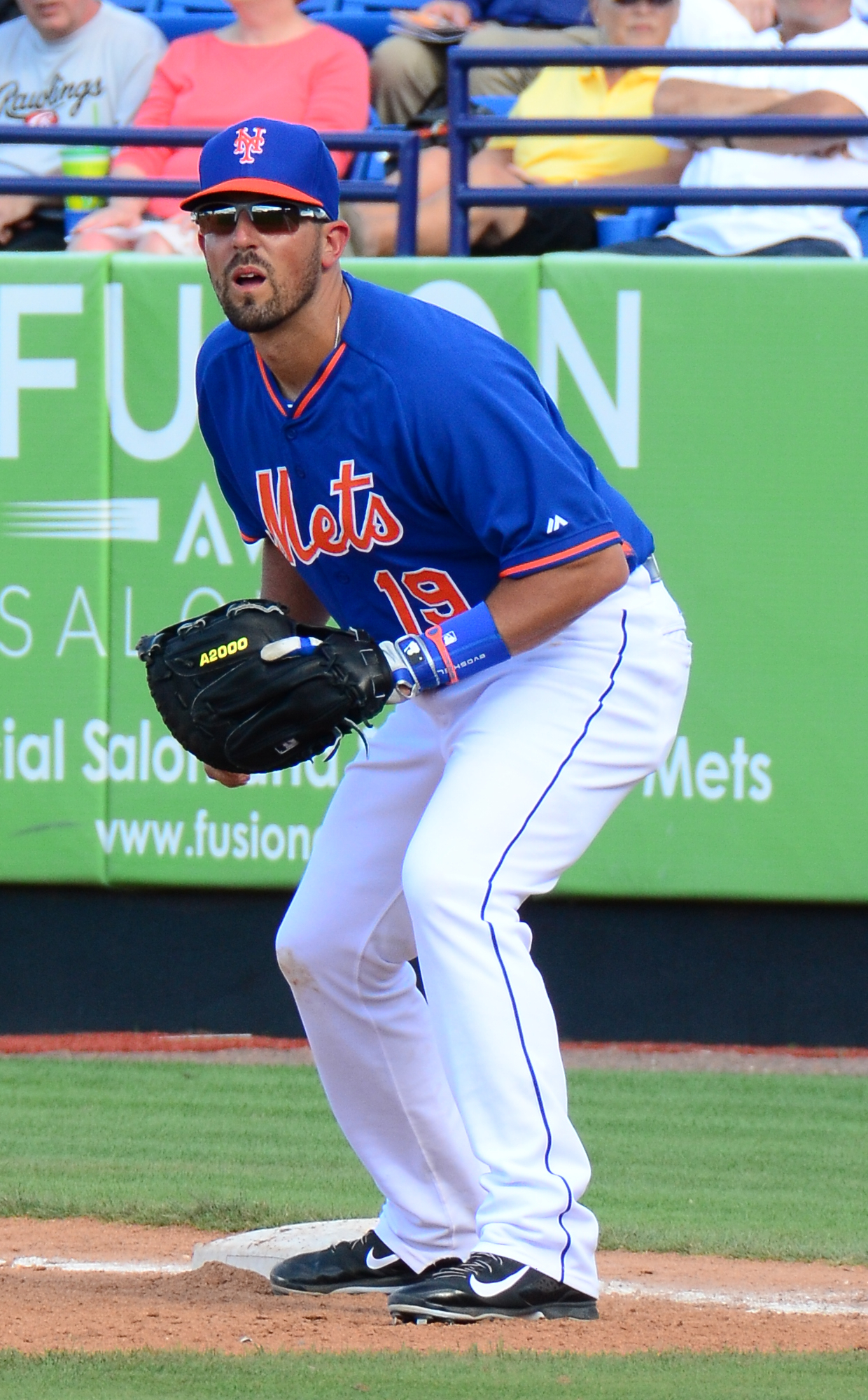 Zach Lutz